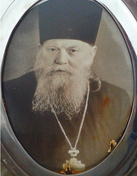 VSergo13